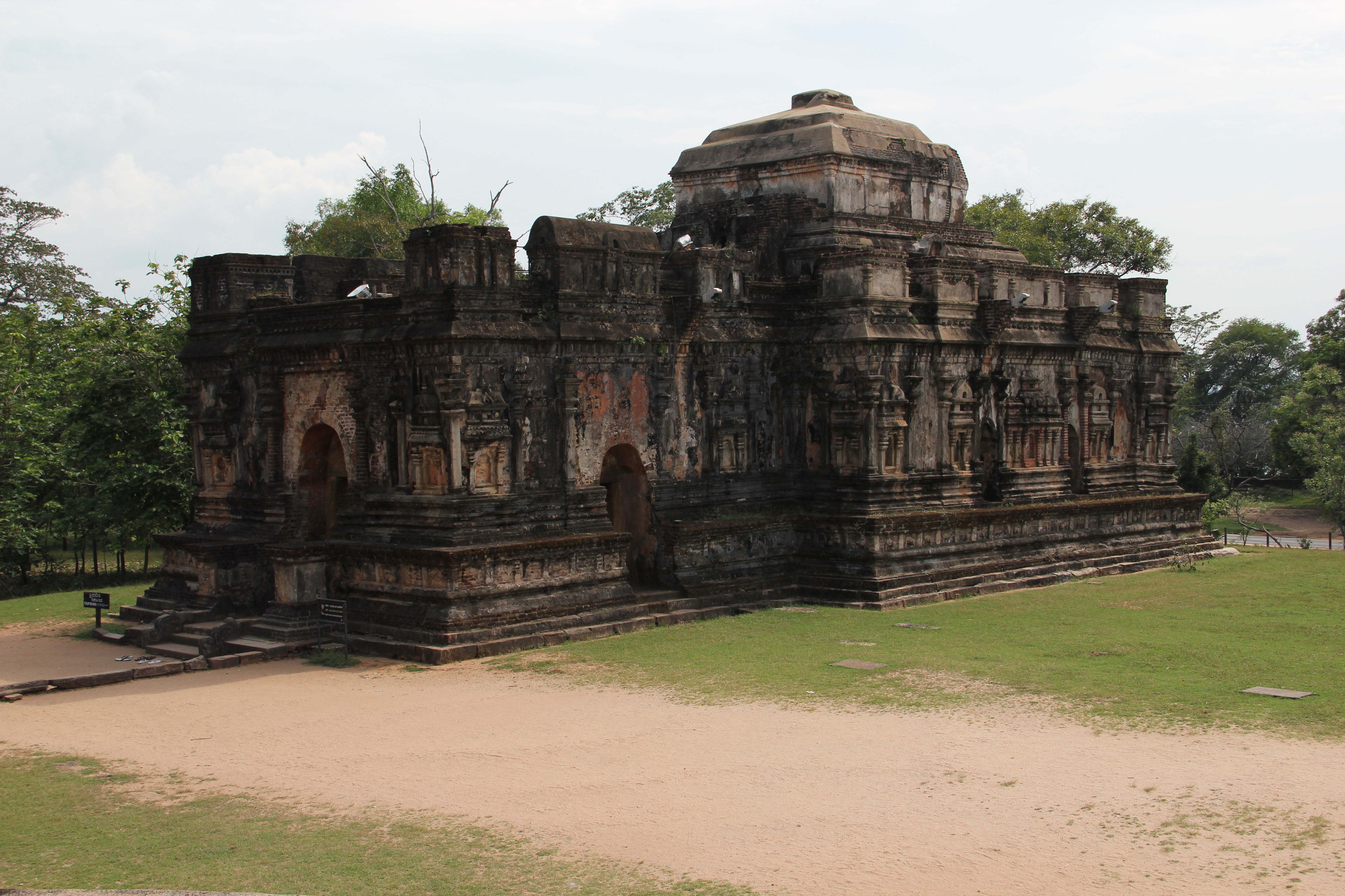 Polonnaruwa Temple